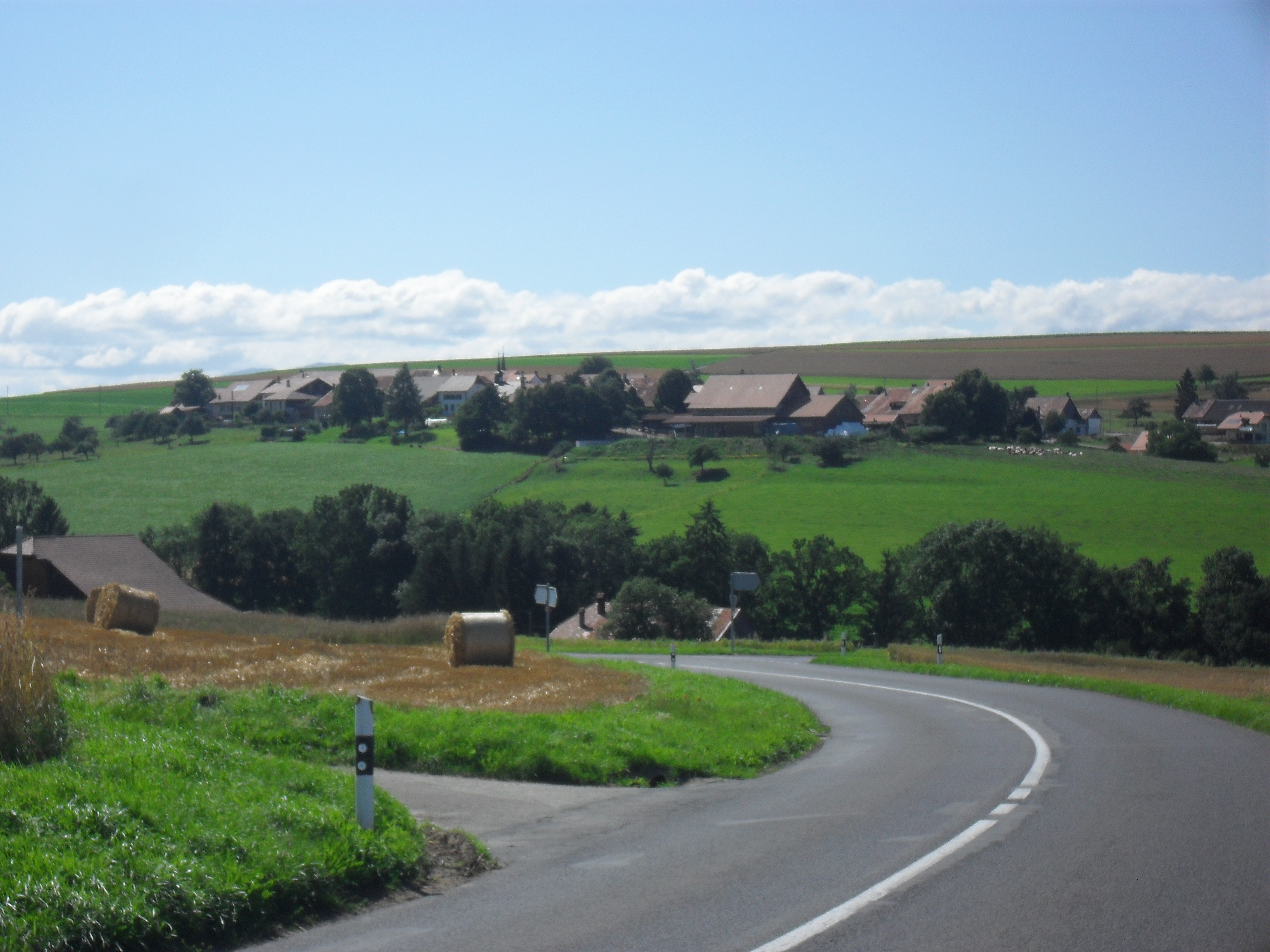 Vue de Champtauroz